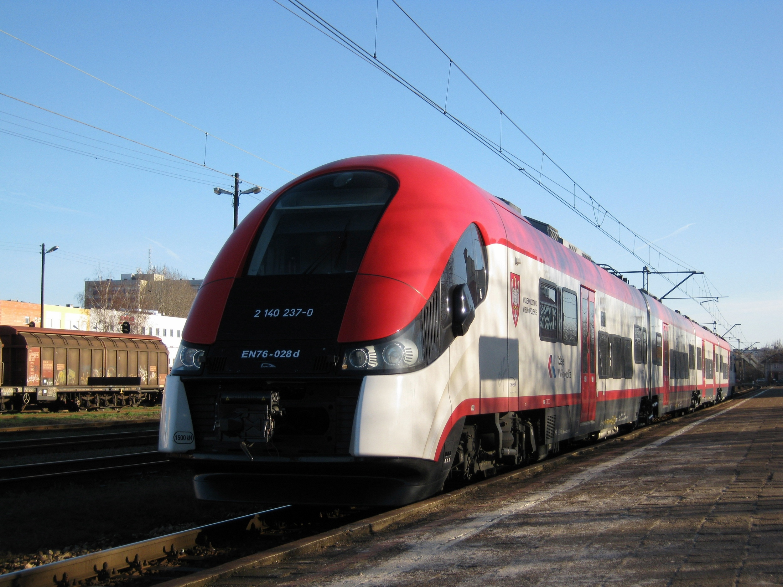 EN76-028 podczas postoju na stacji w Koninie